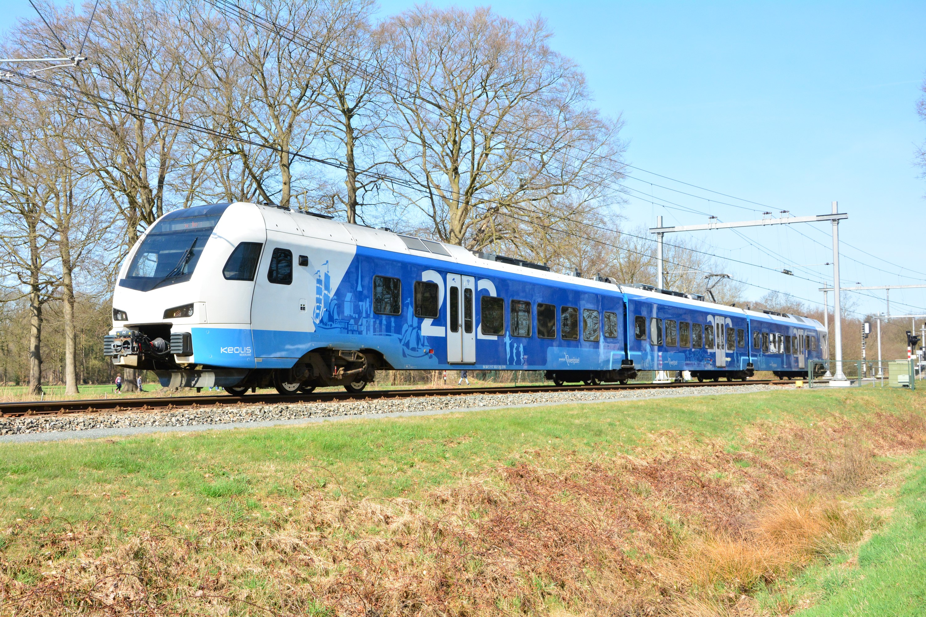 Keolis Flirt 7302 verlaat Heino richting Raalte